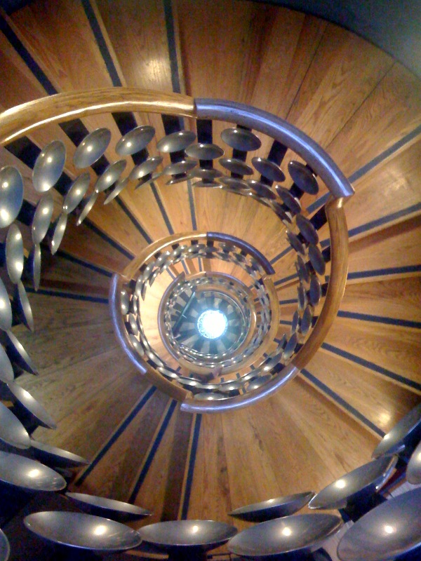 Magic Helix